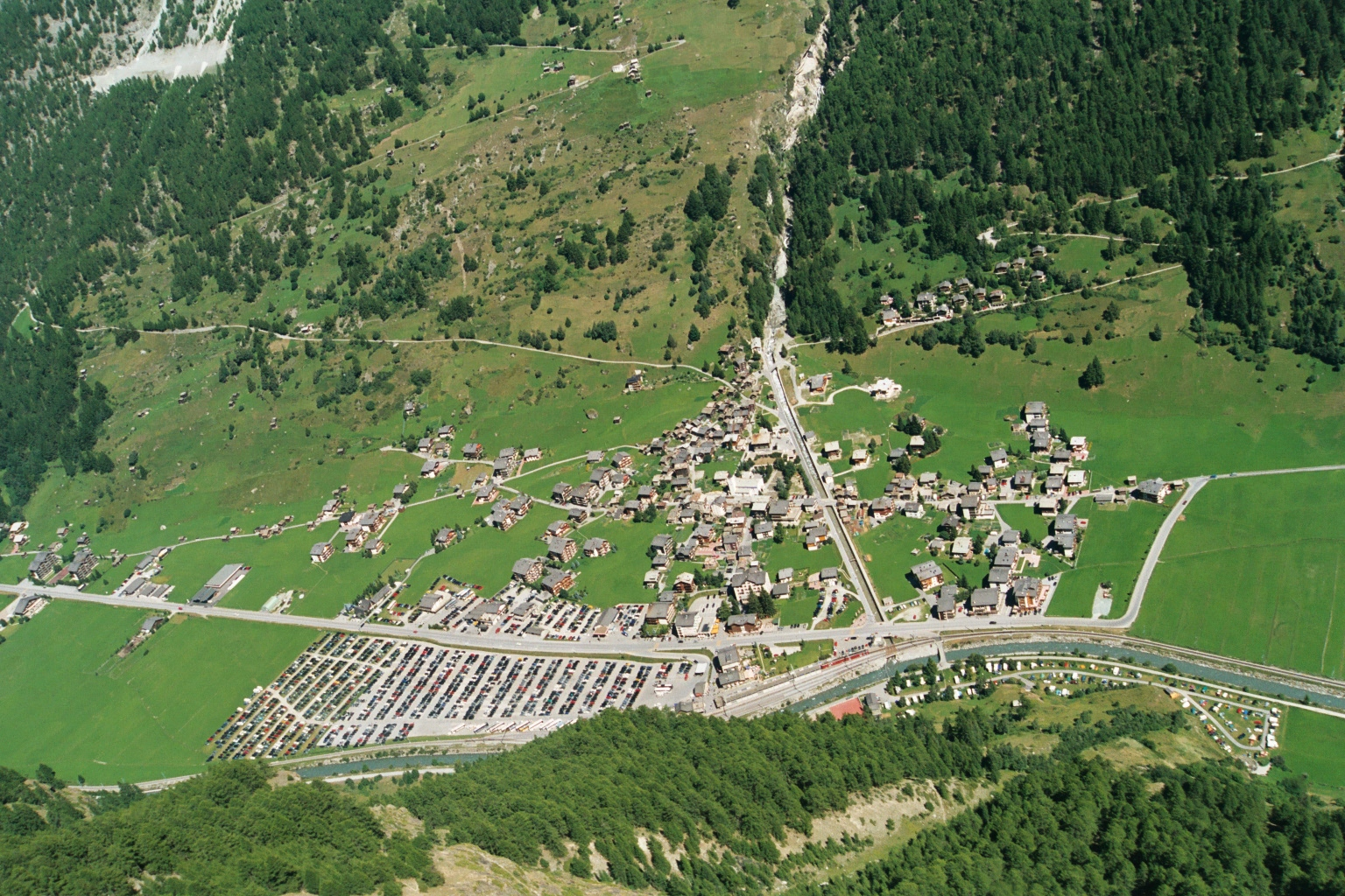 Helikopteraufnahme von Täsch VS, von renatobucher